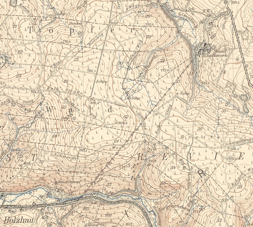 Ausschnitt aus dem Meßtischblatt Serie: Topographische Karte (Meßtischblätter) Sachsen; M 1:25000